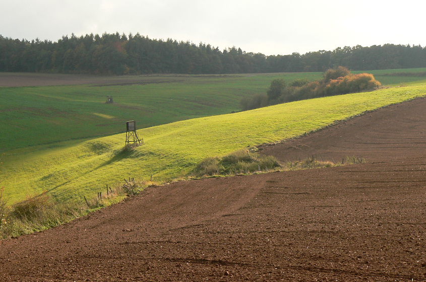 Landschaft bei Bad Wildungen